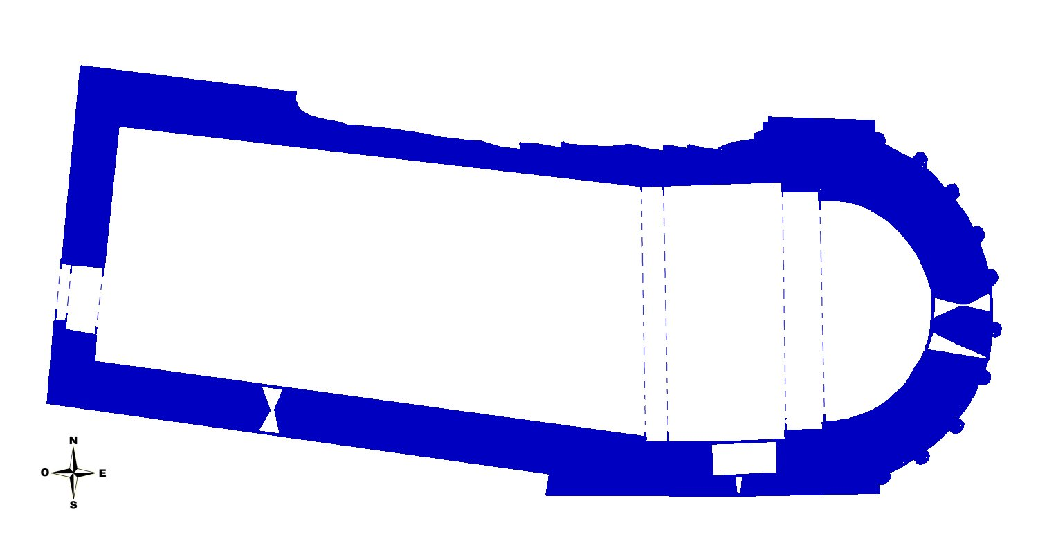 Església antiga de Sant Pere de Madrona (Pinell de Solsonès). Plànol de la planta.